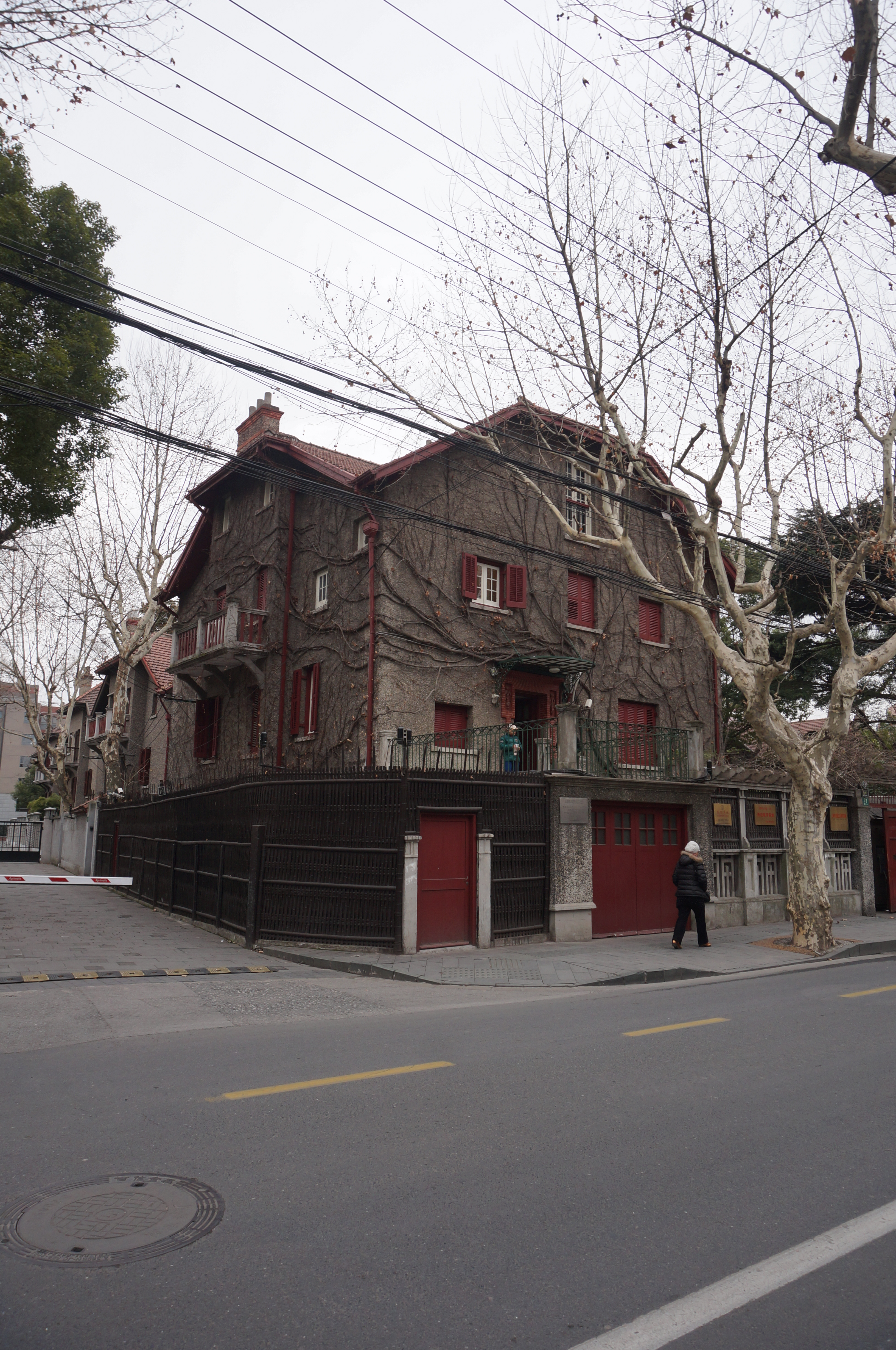 上海义品村周公馆